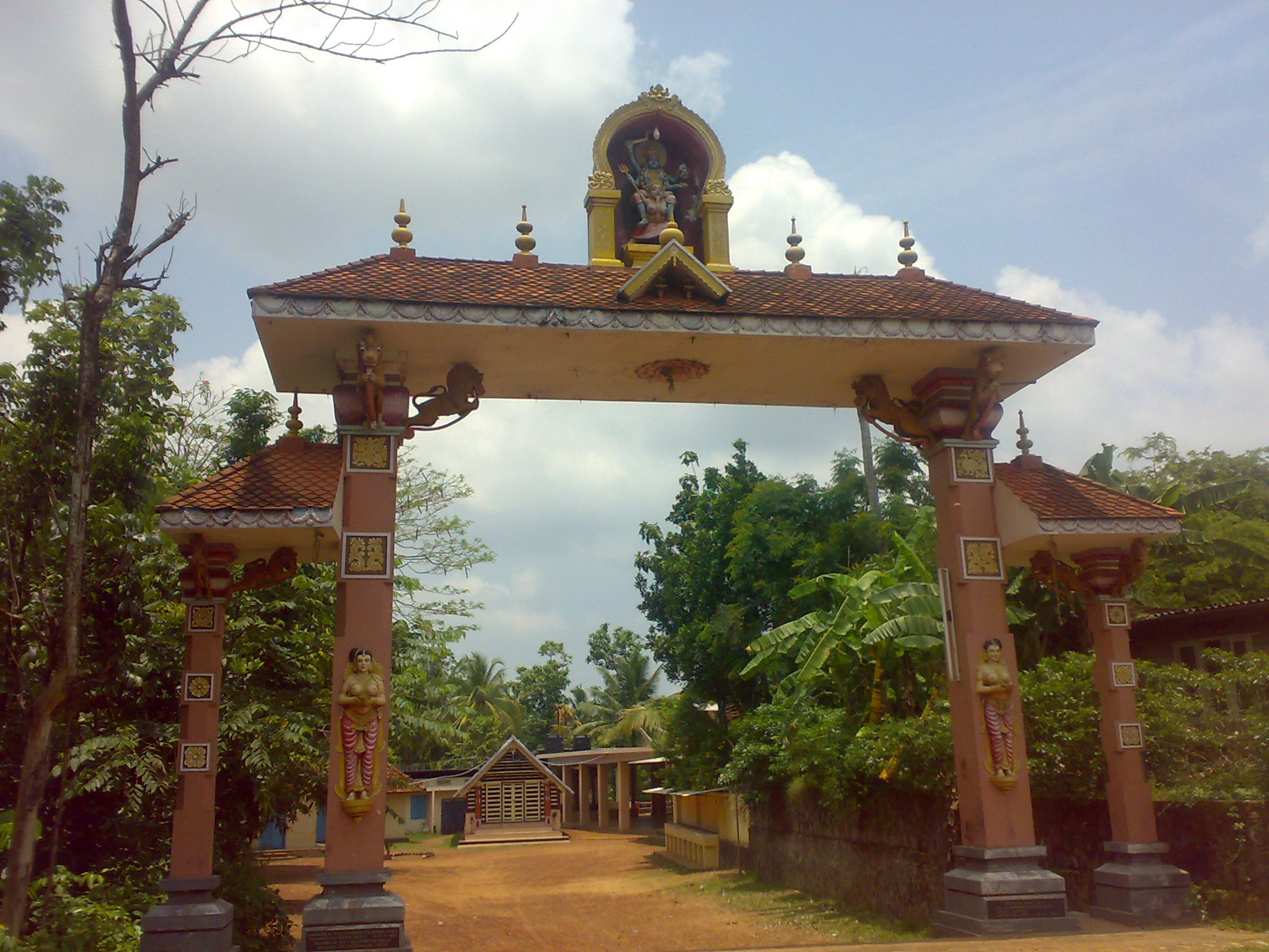 വാഴപ്പള്ളിക്ഷേത്രം കല്‍ക്കുളത്തുകാവ് ദേവീക്ഷേത്രകവാടം (പടിഞ്ഞാറെ ക്ഷേത്രക്കുളത്തിന്റെ നടവഴിയില്‍ നിന്നുമുള്ള കാഴ്ച)